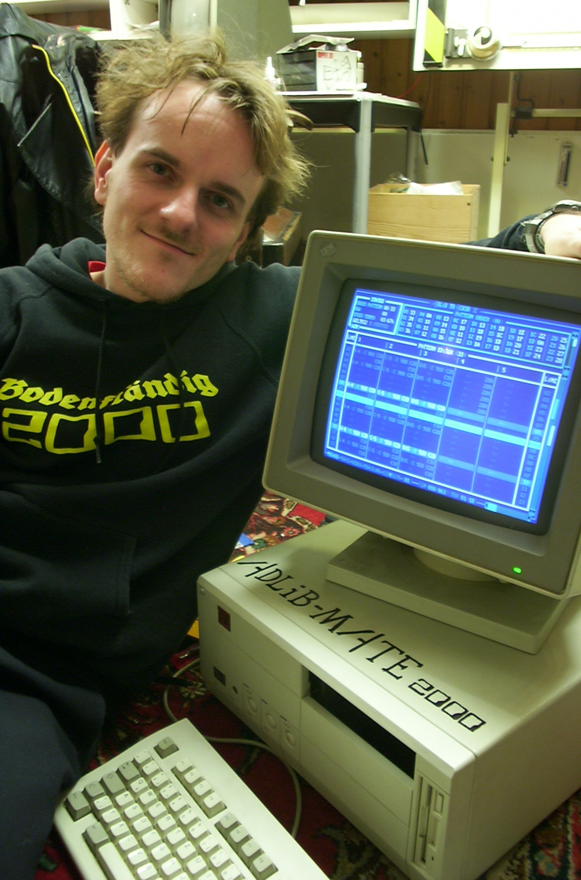 Dragan Espenschied, Saarbrücken, Nov 2000